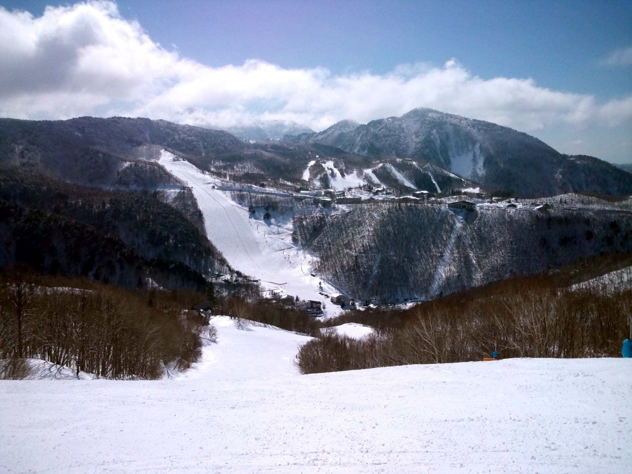 西館山からみたジャイアントスキー場と蓮池スキー場。西館山スキー場から撮影。私のスマートフォン F-12Cにて撮影。座標は目安です。